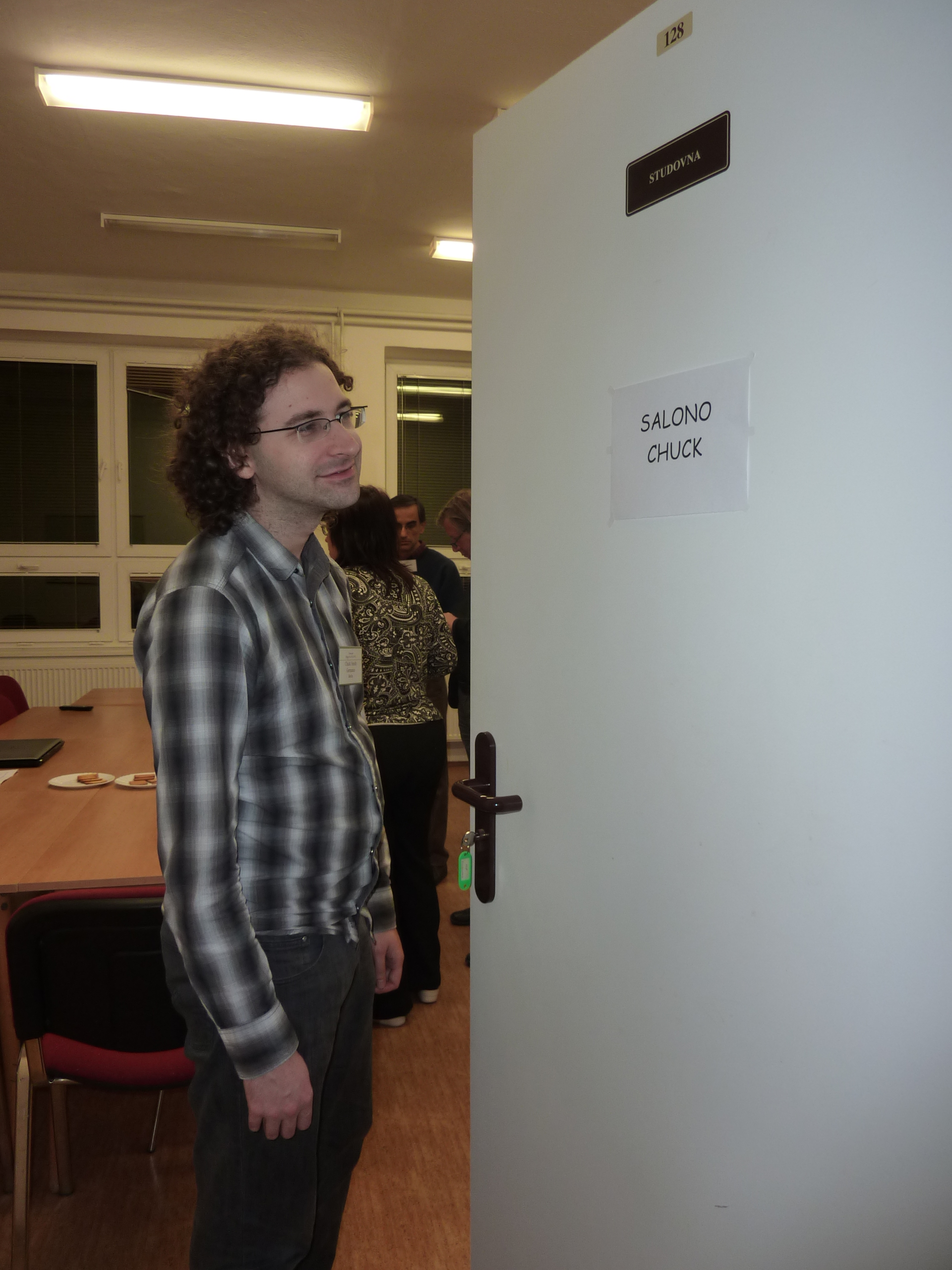 Chuck Smith dum Esperanta Vikimanio 2011 en Svitavy.